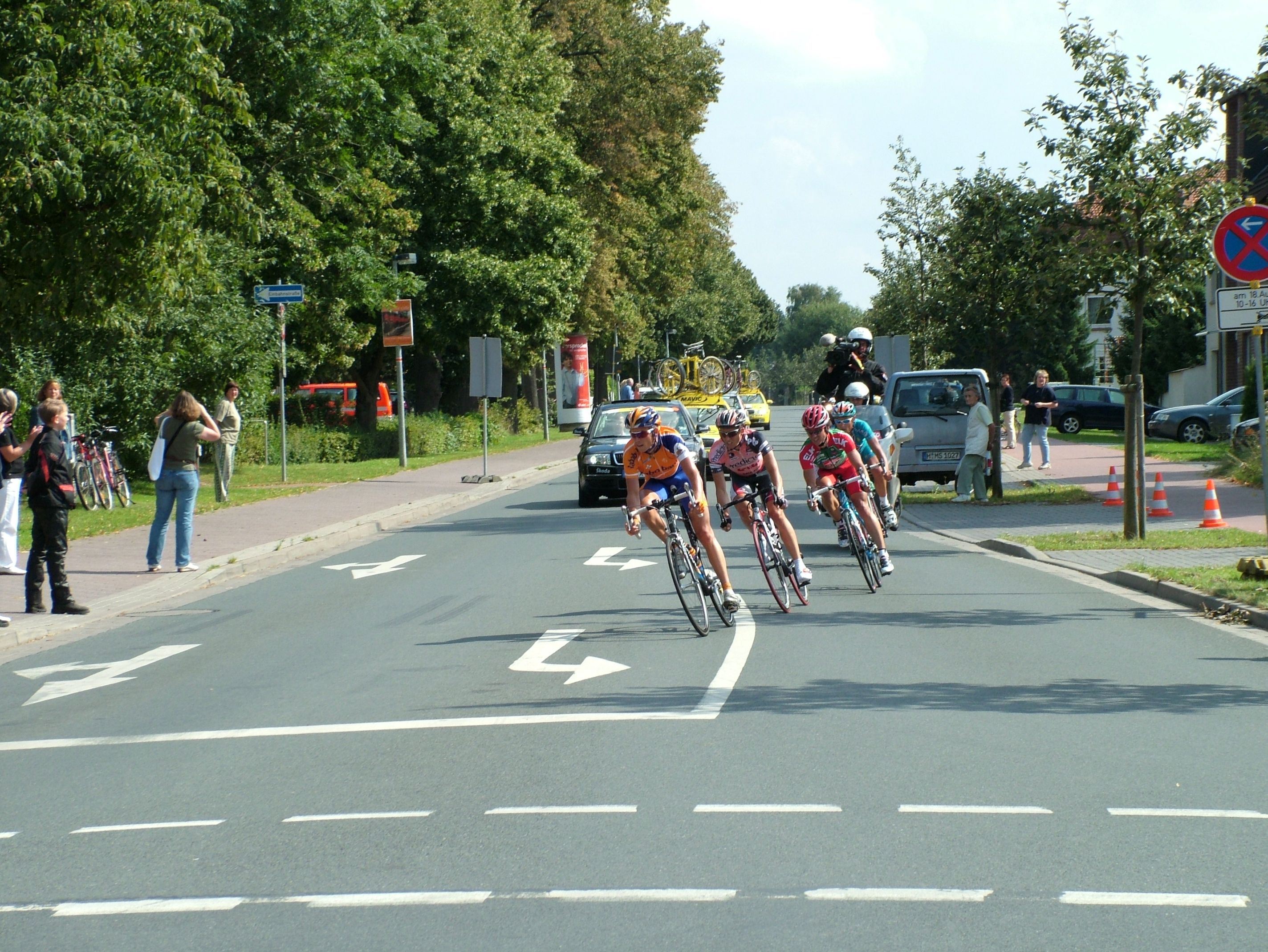 Deutschlandtour 2007, Die Ausreißergruppe in Pattensen kurz vor der Sprintwertung, links Grisha Niermann